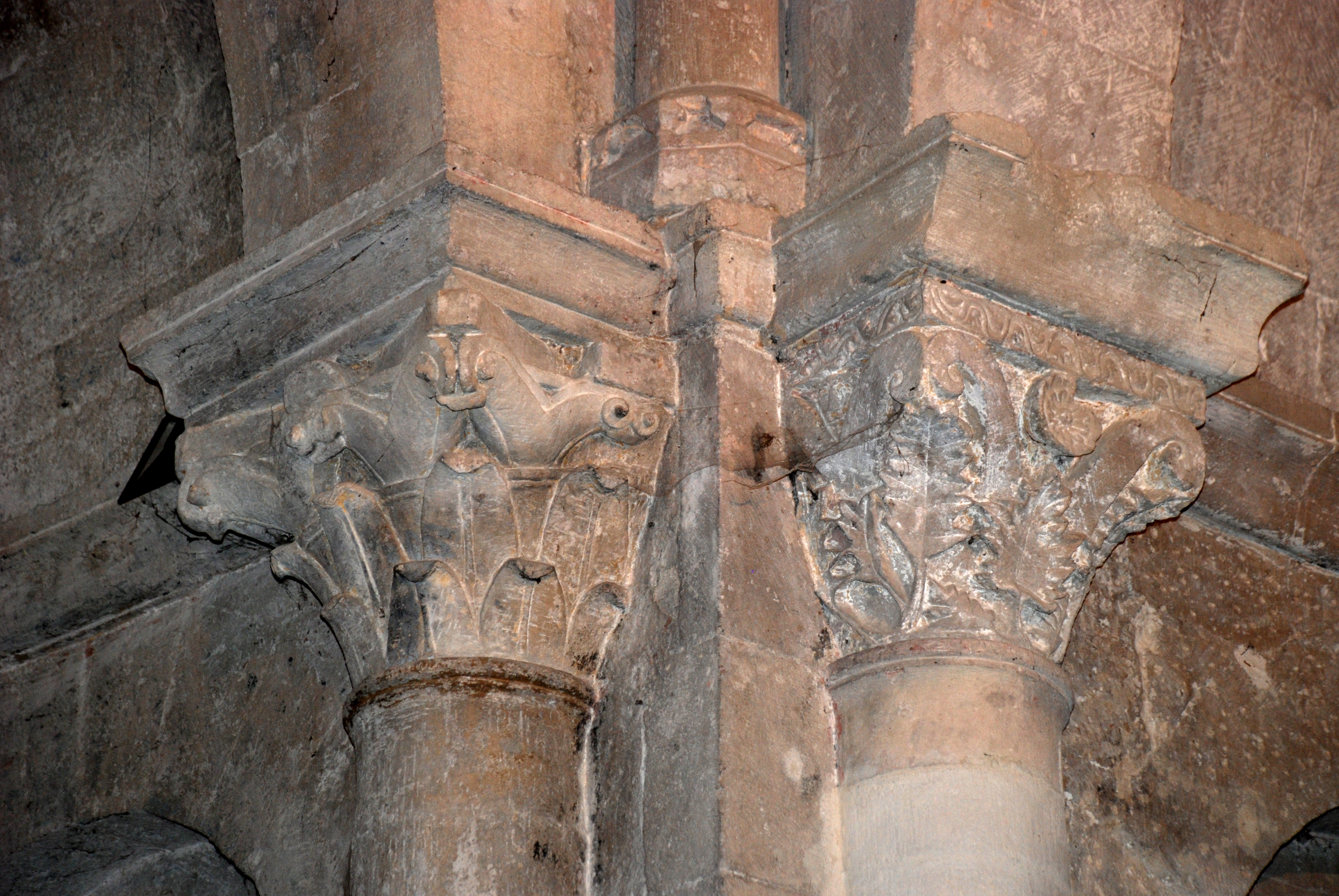 France - Drôme - Église Sainte-Croix de La Baume-de-Transit